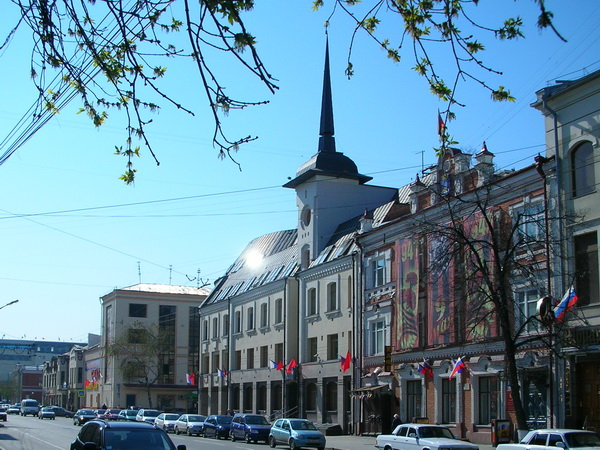 Отреставрированное здание по ул. Республики в Тюмени